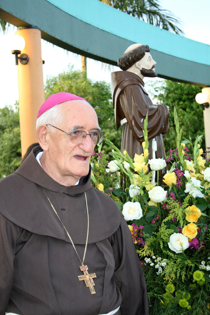 2º bispo de Bacabal